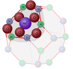 Sodalit-Käfig mit Positionen von Al, Si, O und einem Kation Me+